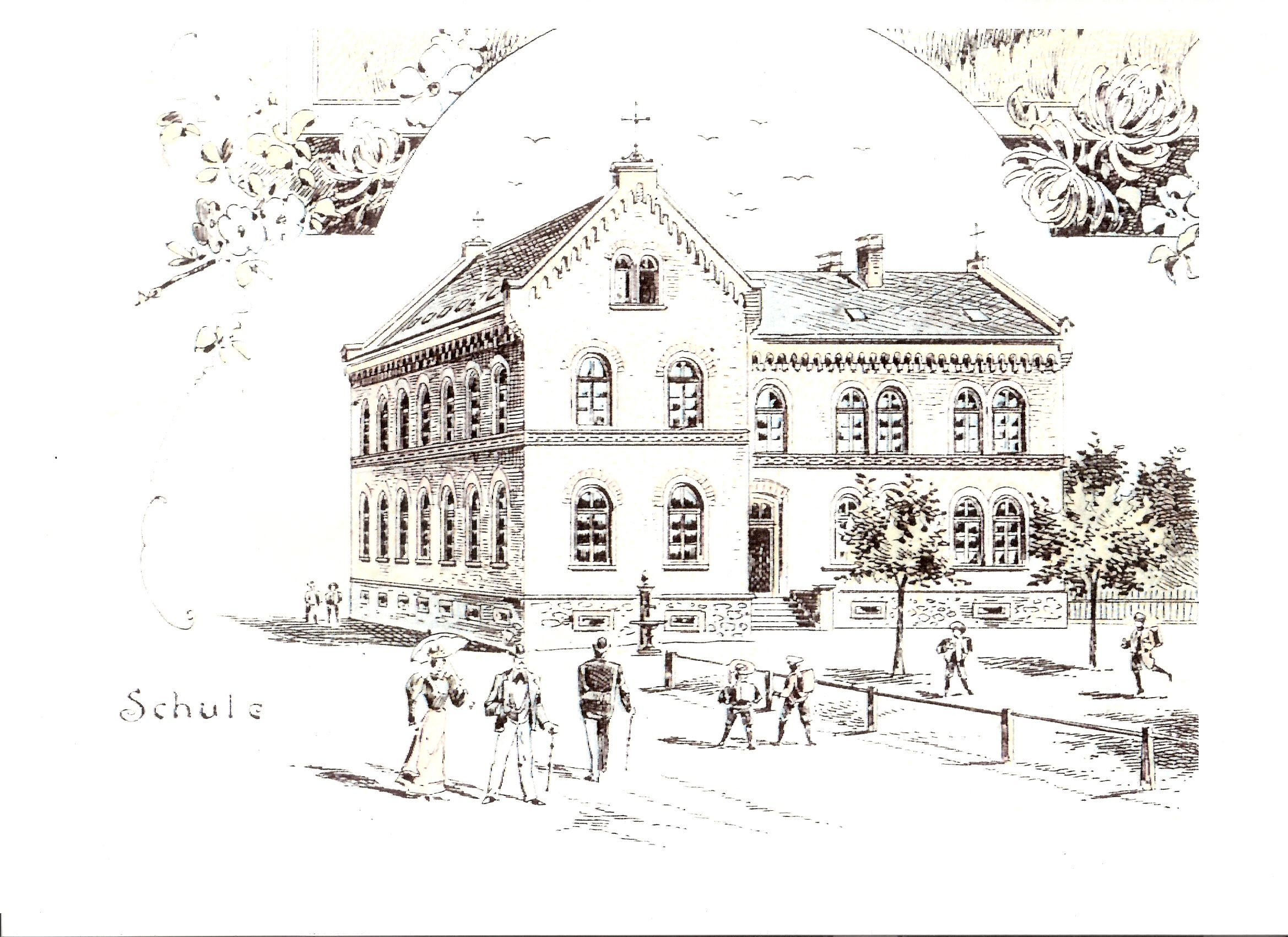 Obertiefenbach (Beselich) – Schulgebäude um 1900